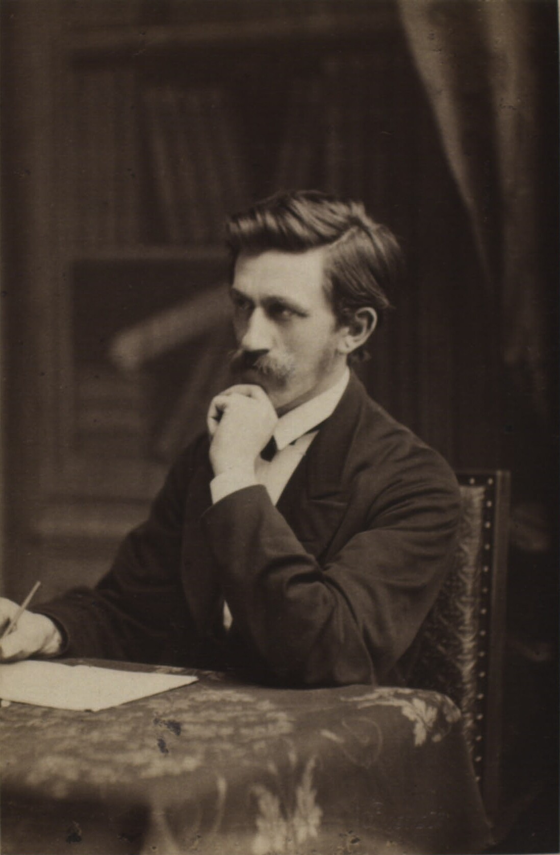 Fot. Hansen & Weller Bredgade 28 Kbh. K.